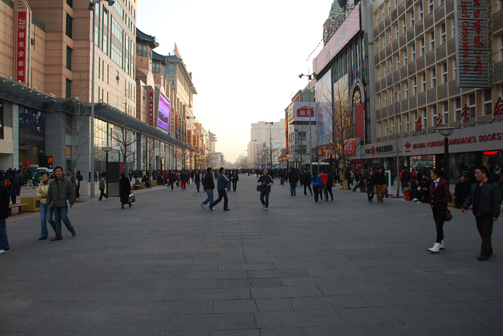 中文（中国大陆）: 王府井步行街